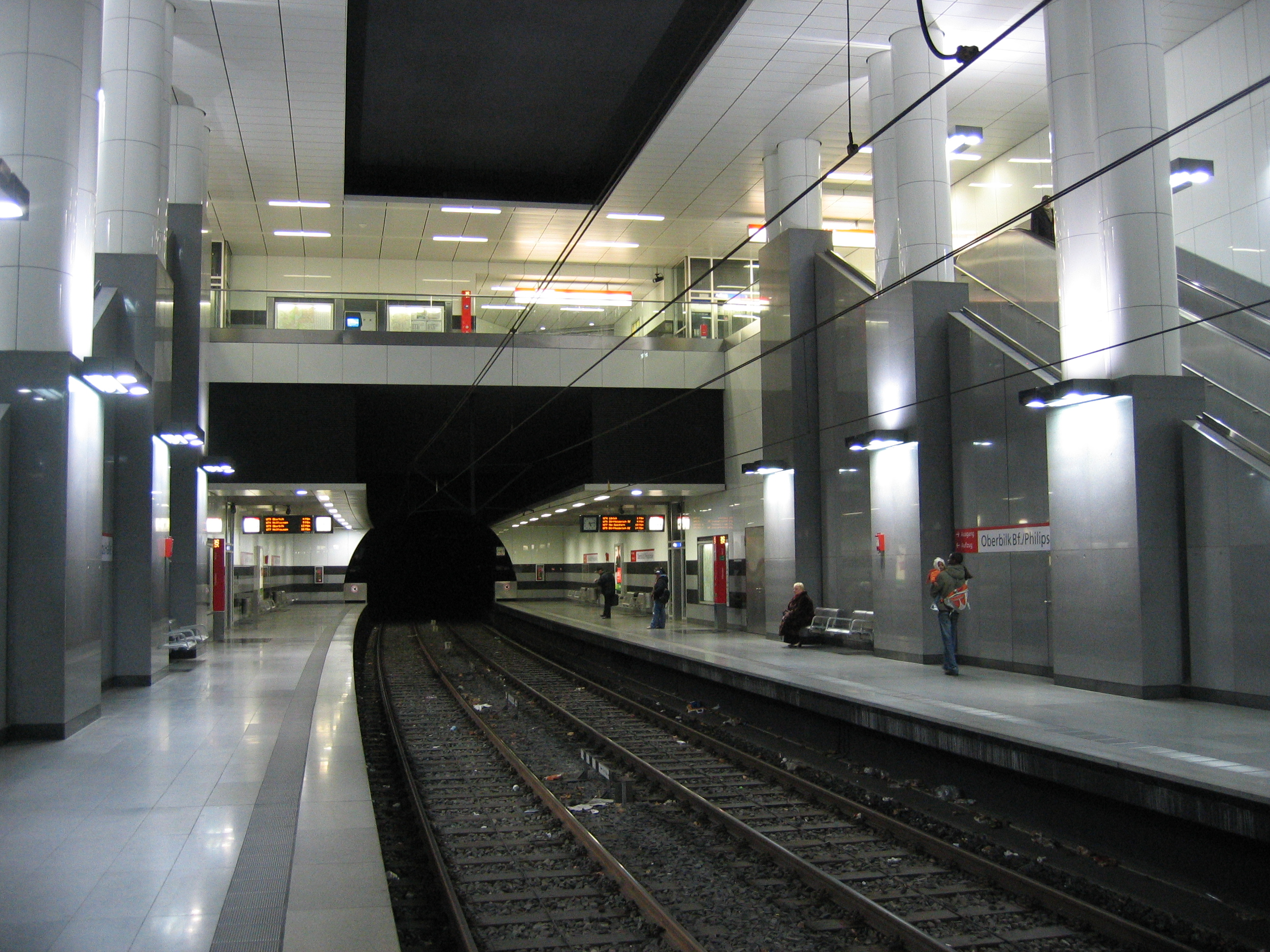 Stadtbahn Düsseldorf, U-Bahnhof Oberbilk S-Bahn / Philipshalle